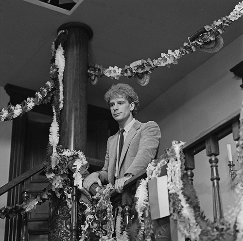 Peter Bos als Frans van der Steg in de Nederlandse televisieserie De Zevensprong in 1981